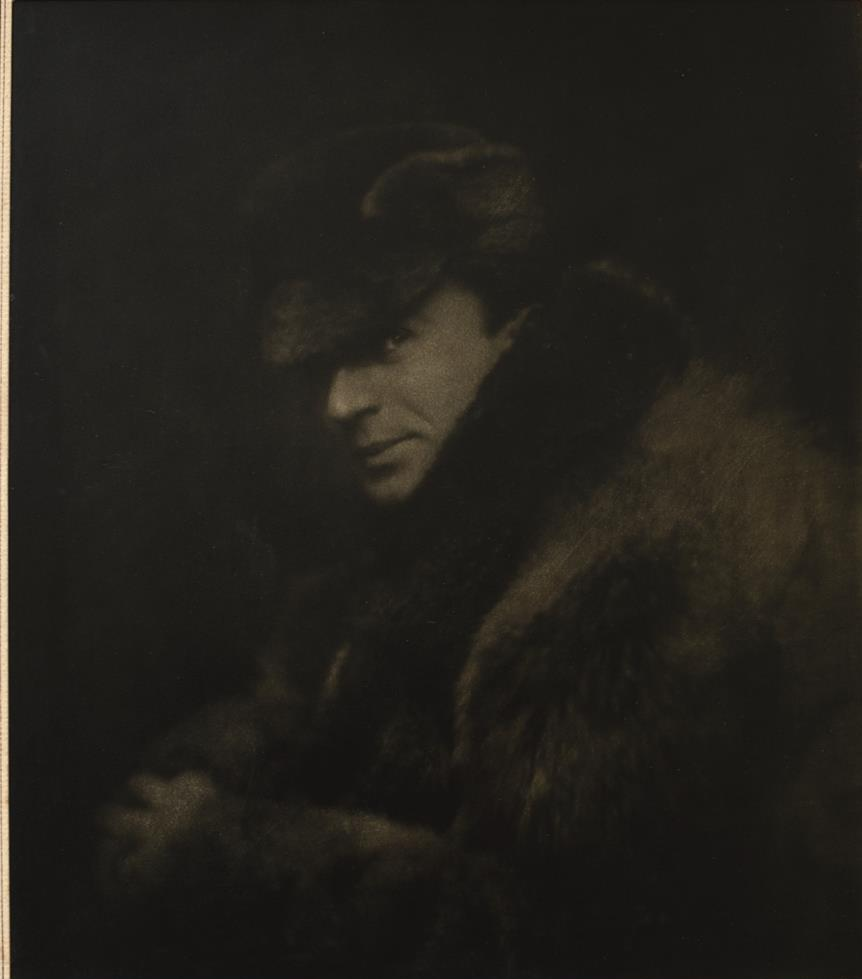 Edward Steichen en pilote automobile, ente aux enchères "Photographies par Otto Wegener (1849-1924)" à Hôtel de vente Drouot le 8 novembre 2018. Préemptée par le musée Rodin.